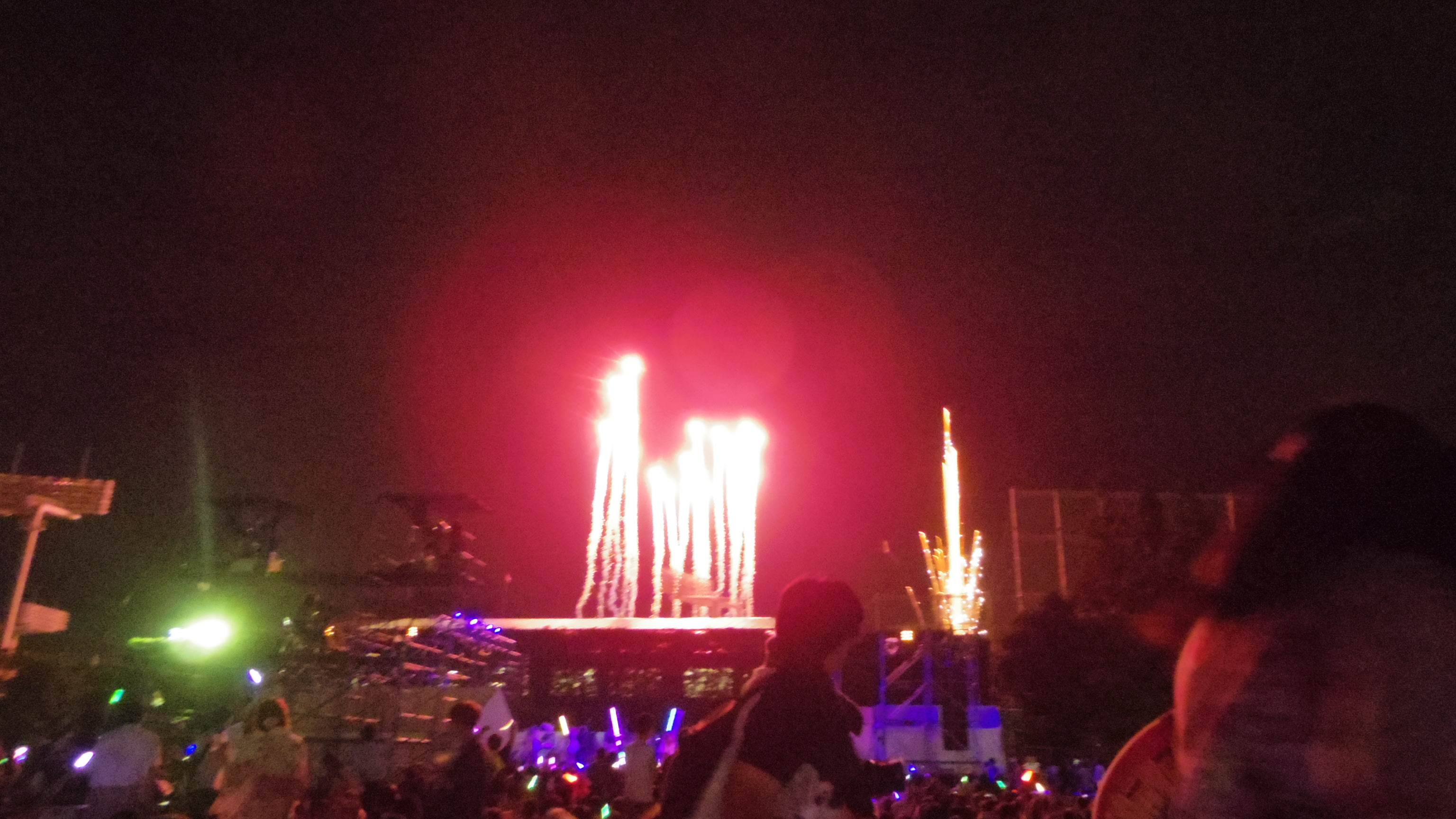 「東日本大震災復興チャリティー 日刊スポーツ主催2015神宮外苑花火大会」（2015年8月11日）。